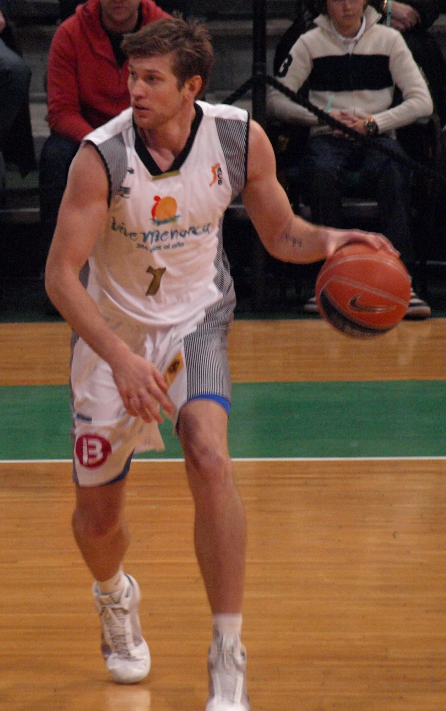 Vladimir Boisa, en el partido que enfrentó al Vive Menorca y al DKV Joventut de liga ACB en el Olímpico de Badalona en enero de 2009